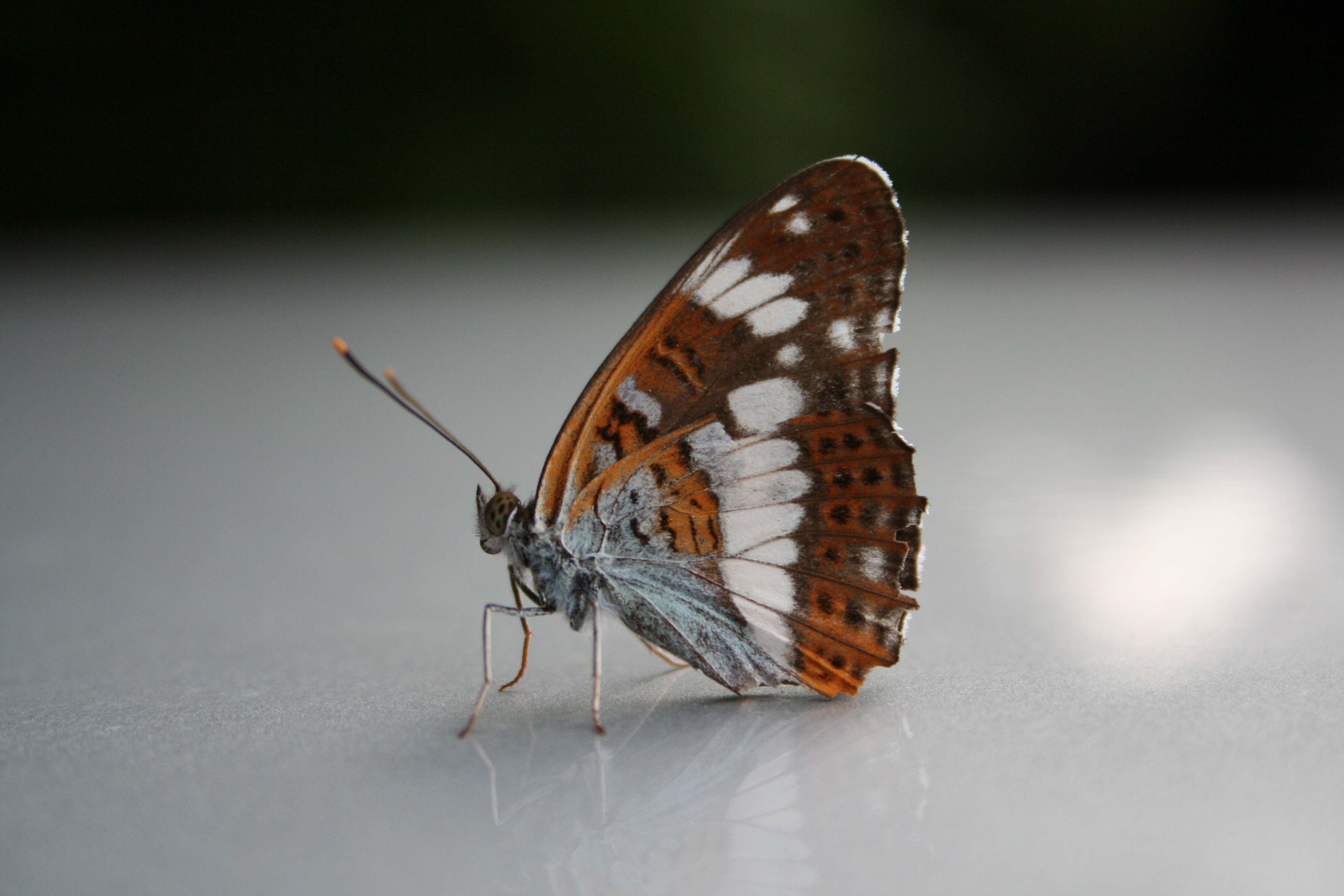 Kleiner Eisvogel (Limenitis camilla), aufgenommen am 07.07.2006